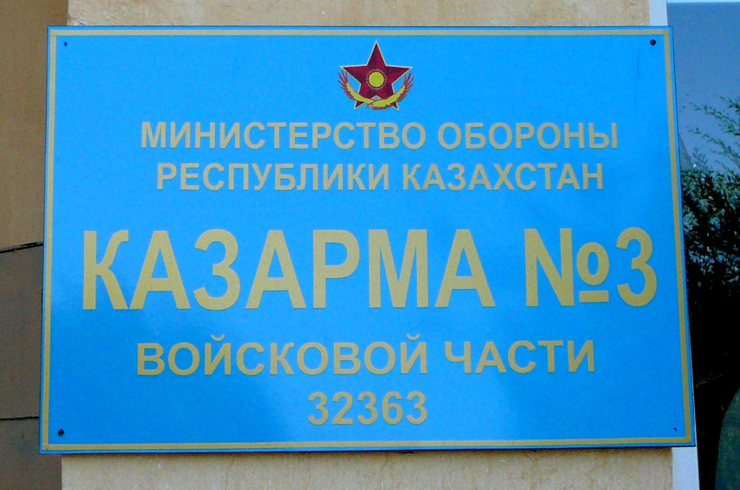 Табличка на казарме с указанием Войсковой части 32363 - 35-й отдельной десантно-штурмовой бригады Вооружённых Сил Республики Казахстан